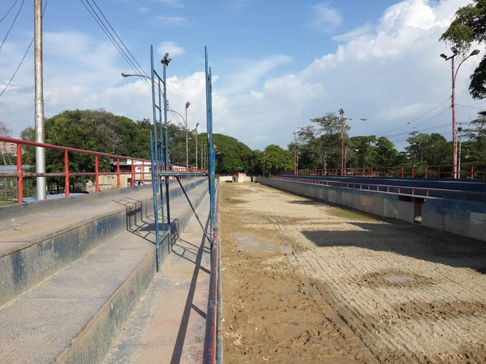 Manga de coleo Veteranos de Aragua